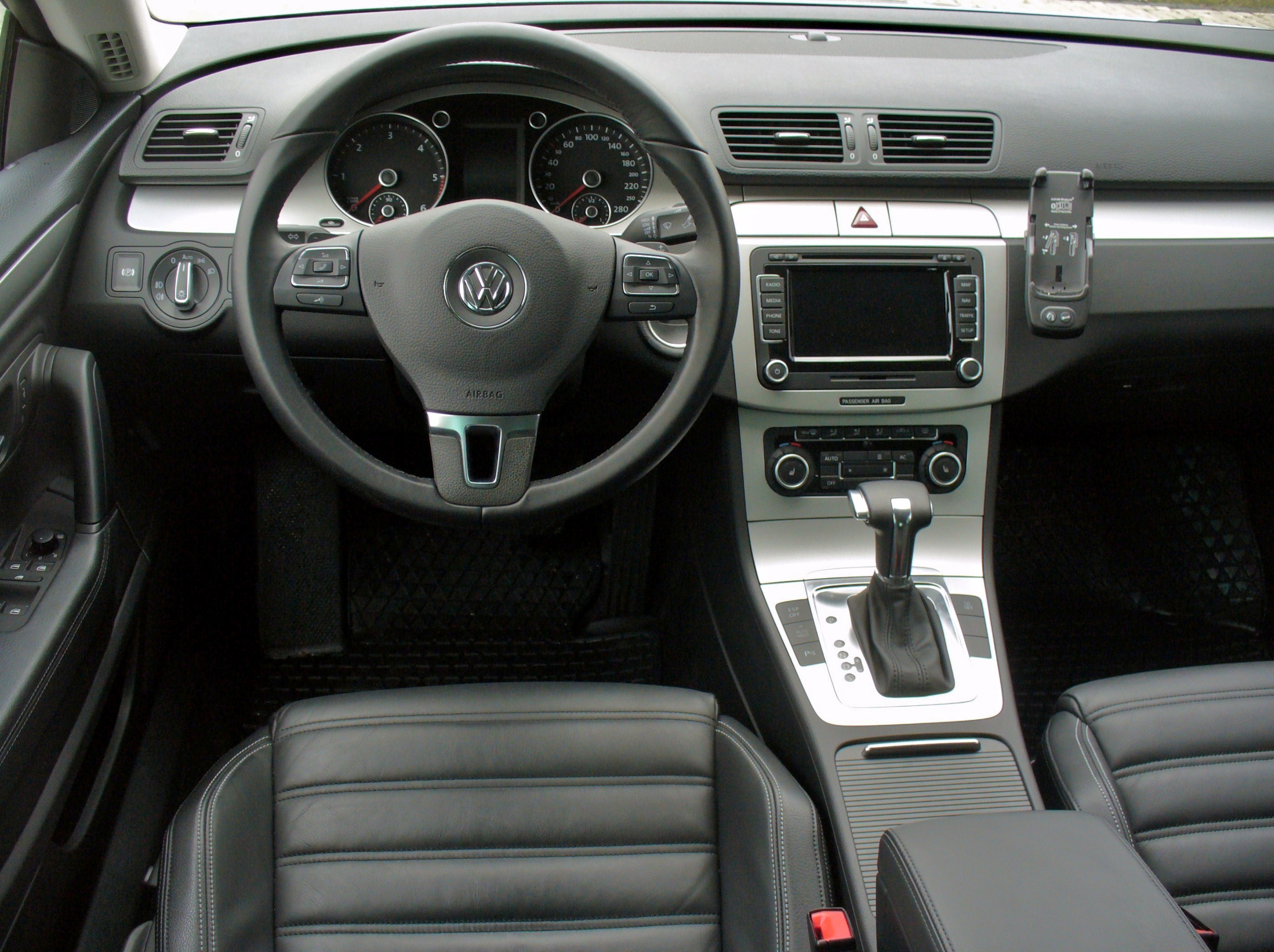 VW Passat CC